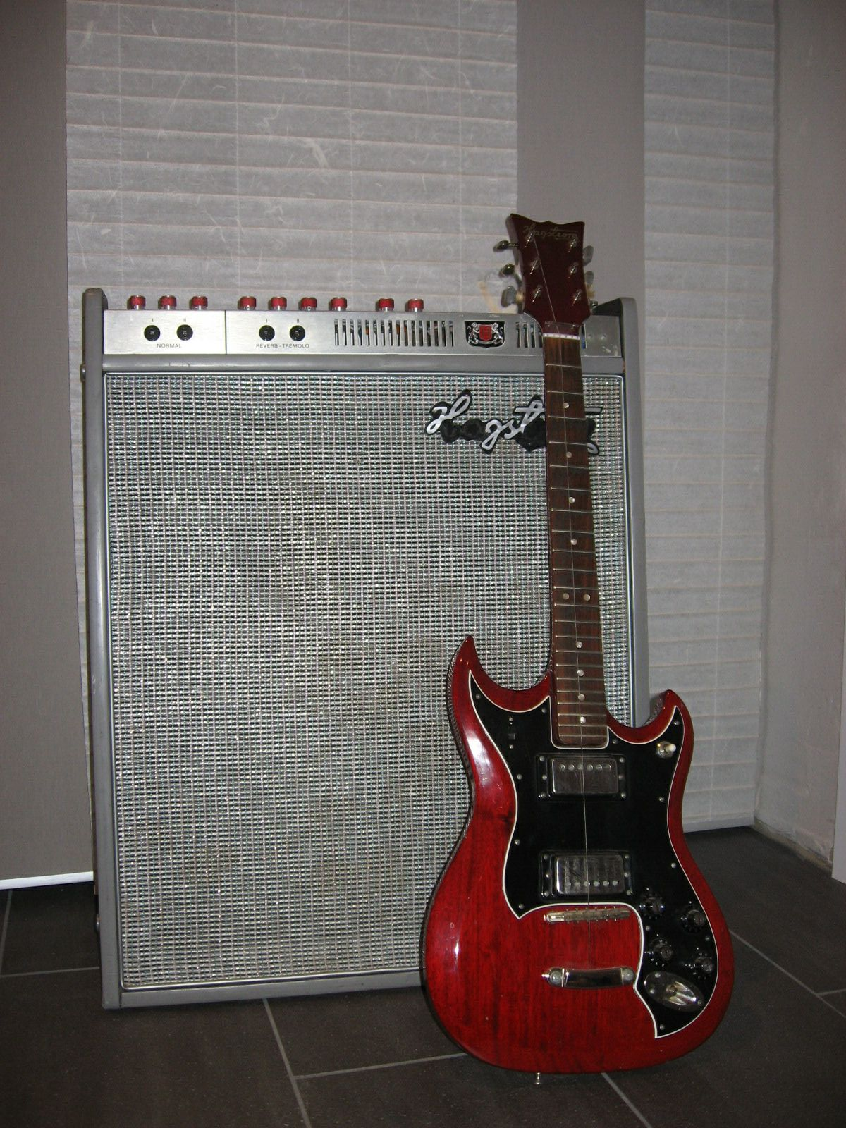 Hagström guitar and amplifier Guitar: Hagström II N OT serial no. 53 954101 from 1975 Amplifier: Hagström GT225 serial no. 53 850020 from 1972